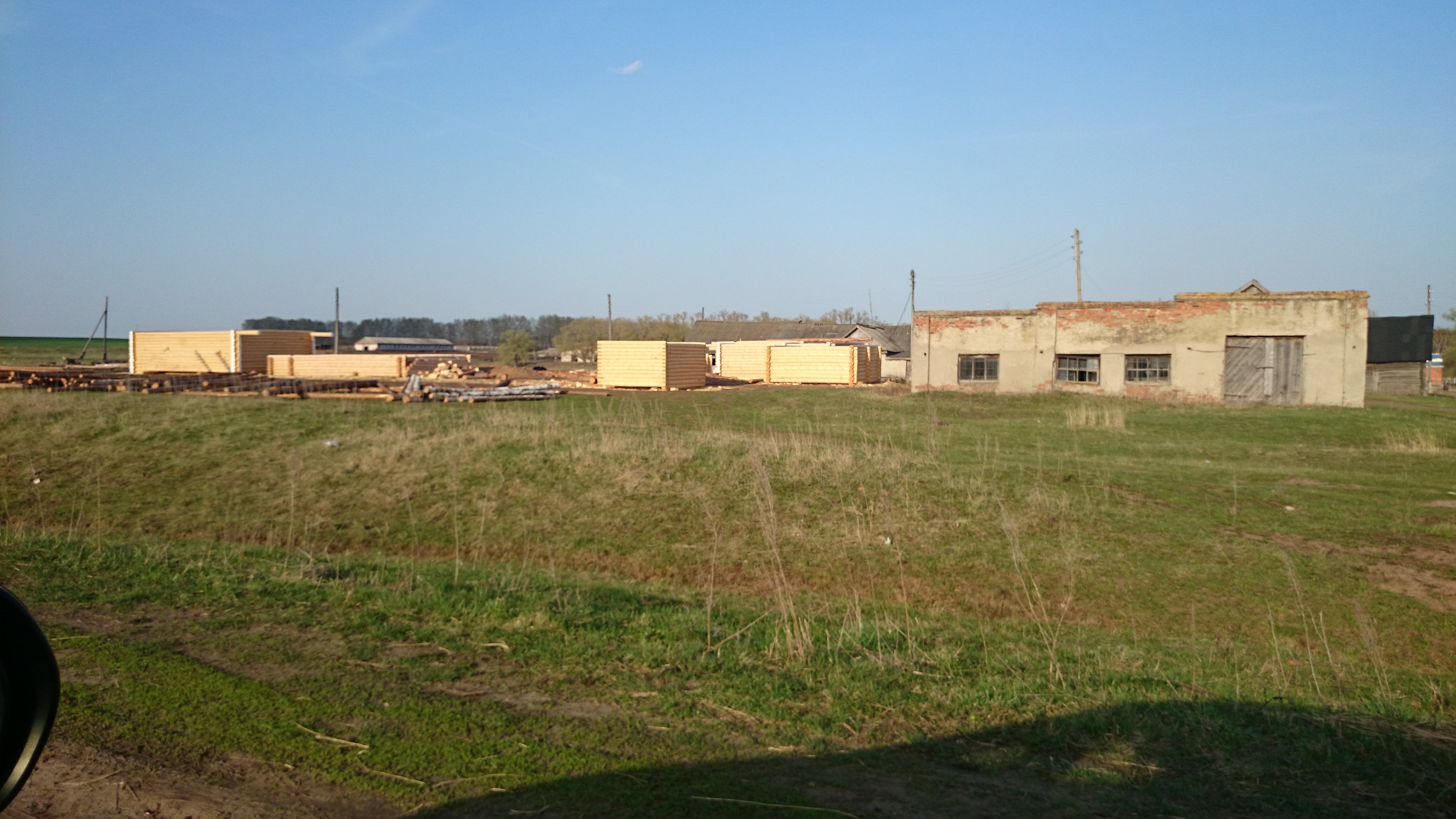 Климово 2 мая 2014